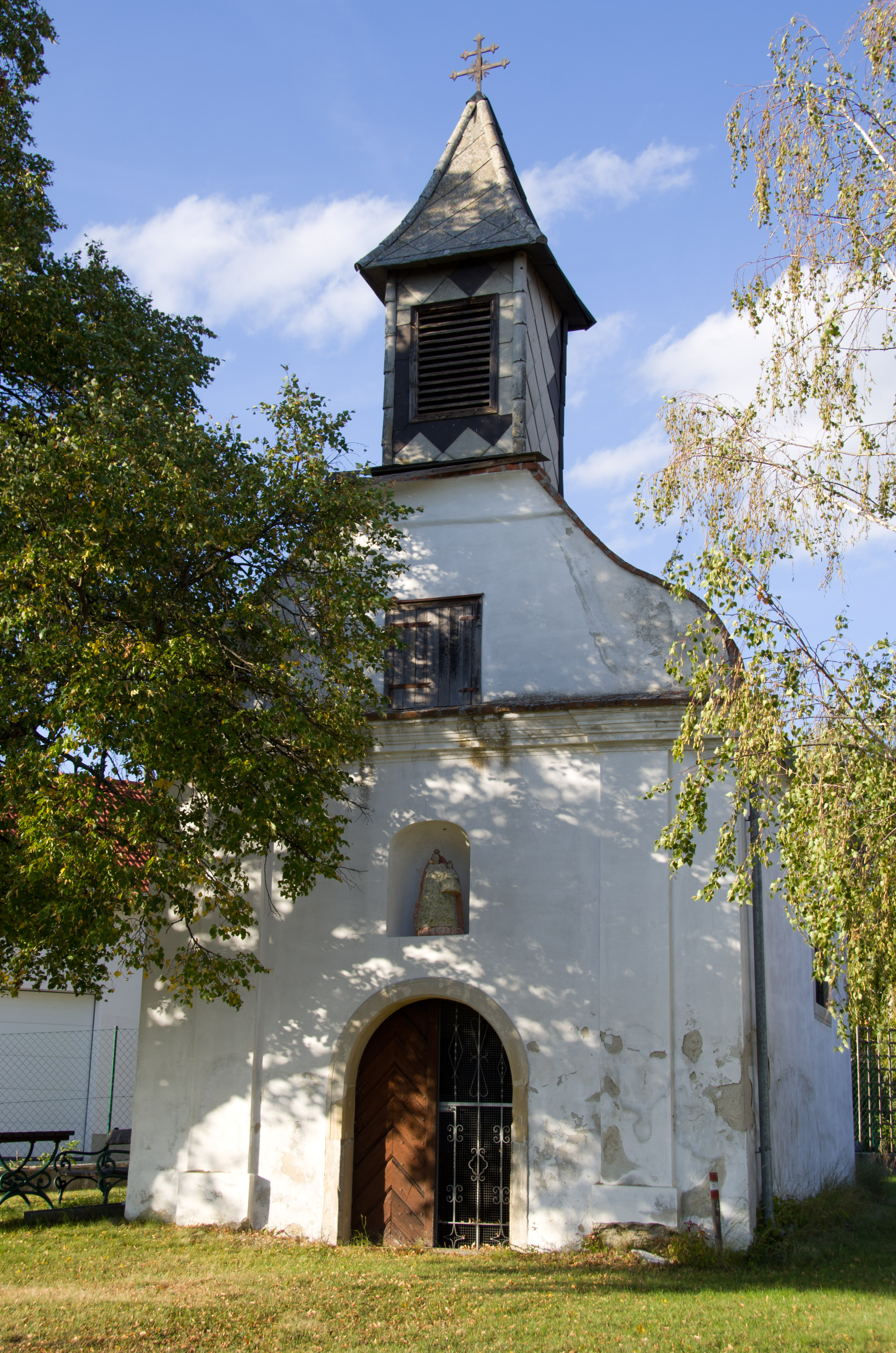 Rosalienkapelle